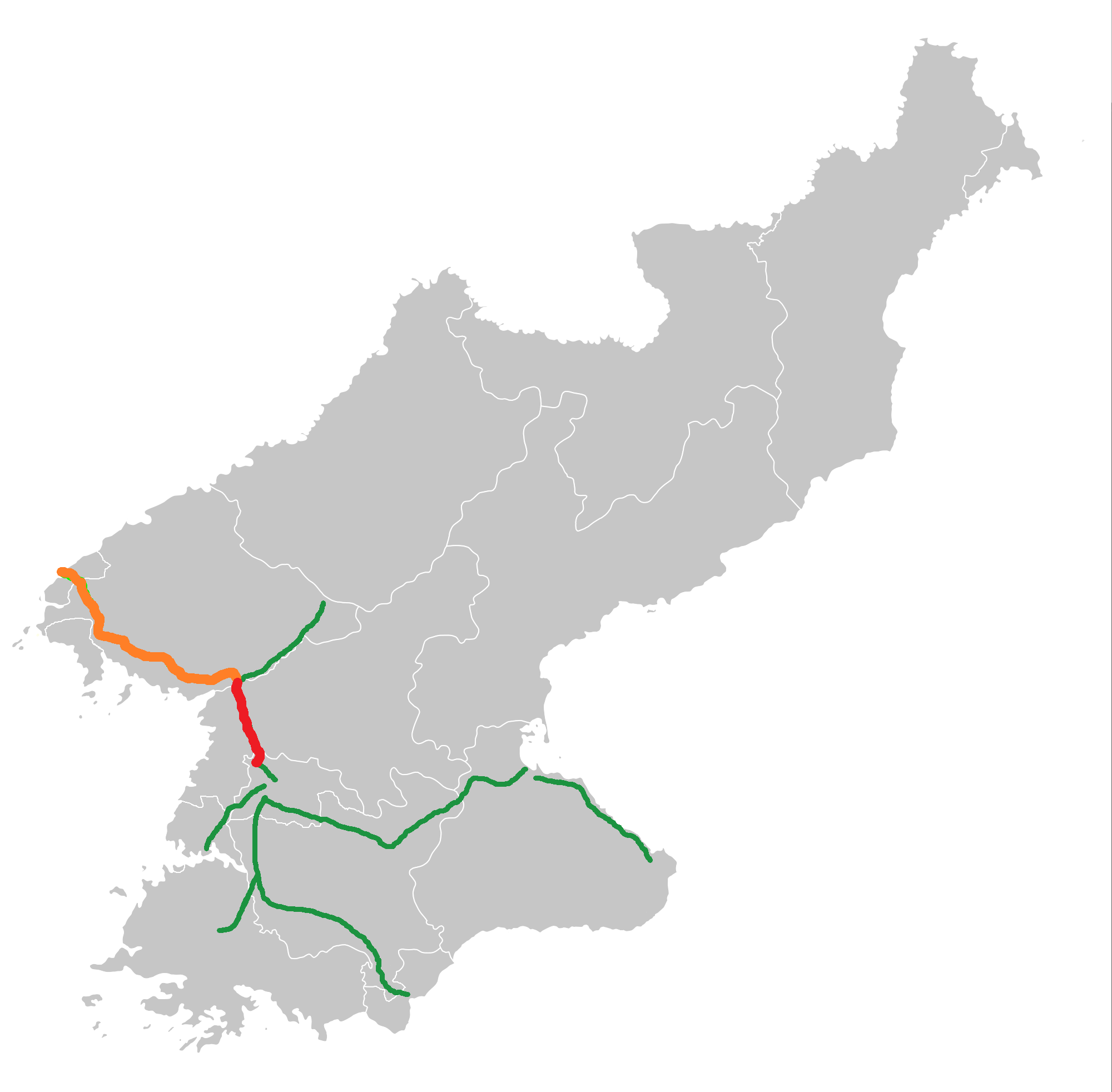 نقشه آزادراه پیونگ یانگ- سینویجو در جمهوری دموکراتیک خلق کزه (کره شمالی)